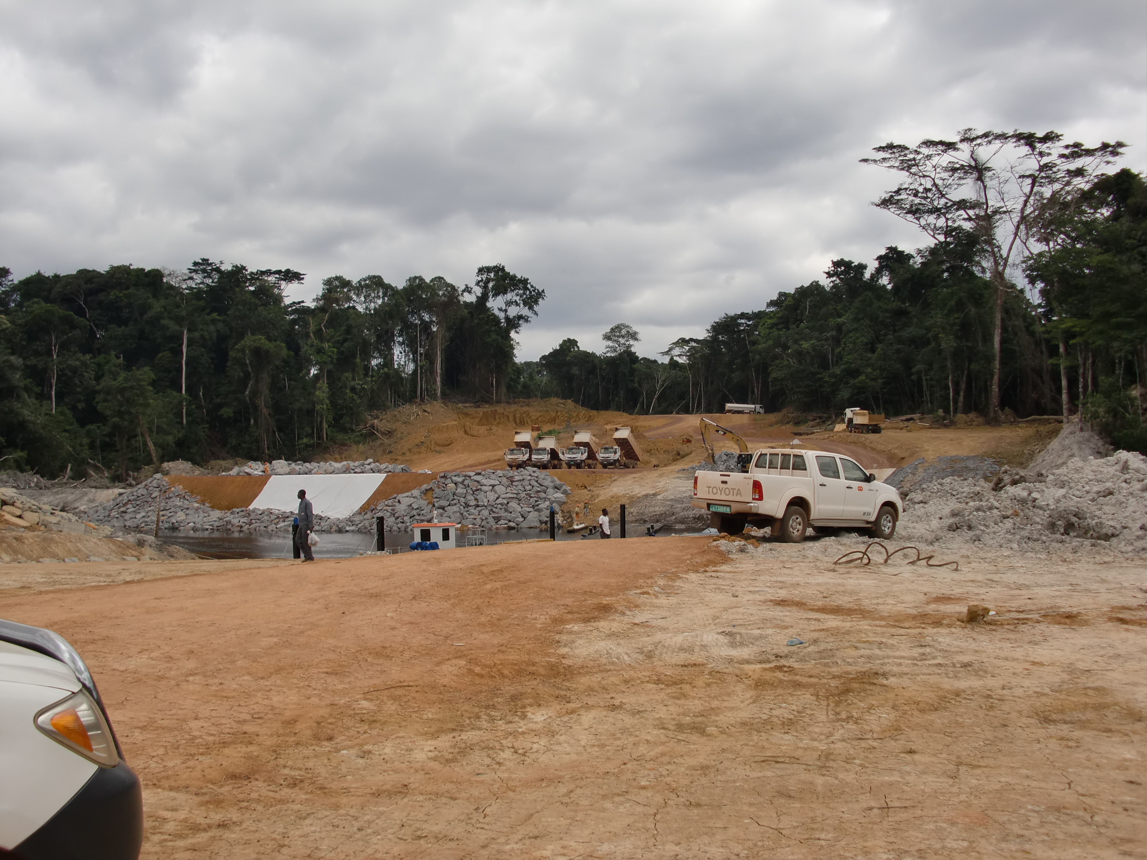 Bau einer Autobahnbrücke über den Rio Wele in der Planstadt Oyala, Äquatorialguinea